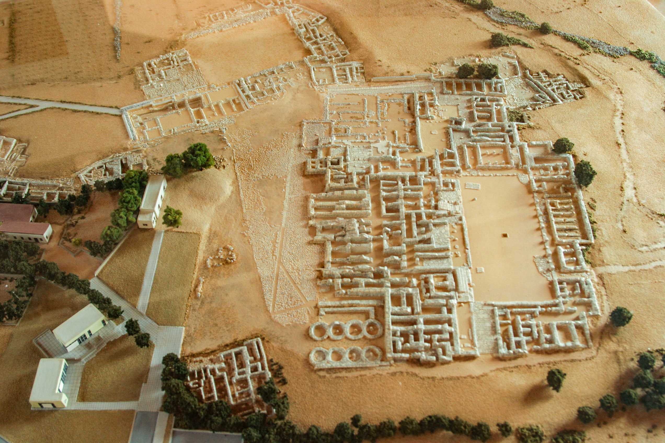 Малийский дворец, остров Крит, 2011 Malia palace, Crete, 2011